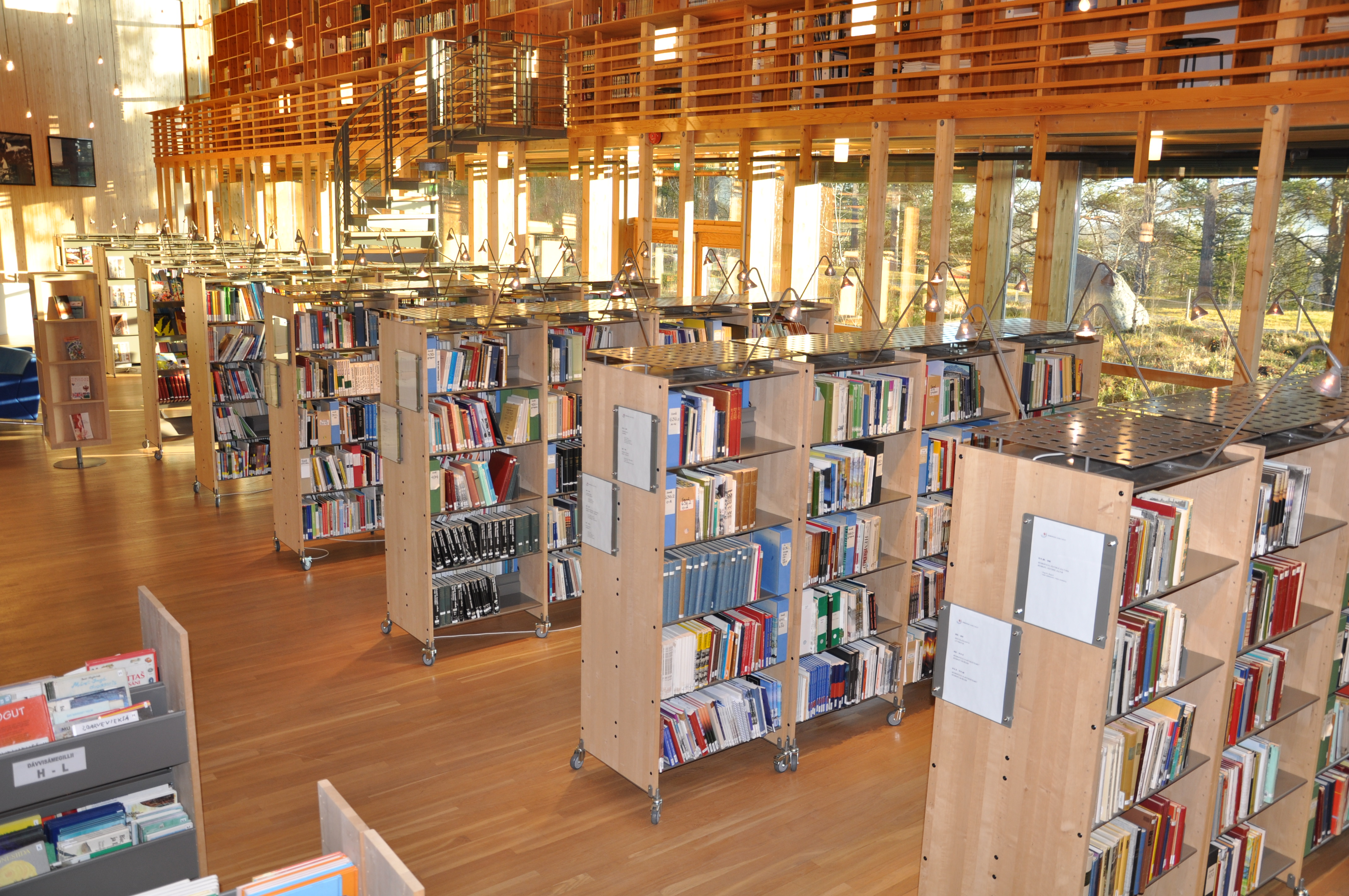 Foto: Sara Marja Magga/Sametinget. Sami Parliament of Norway